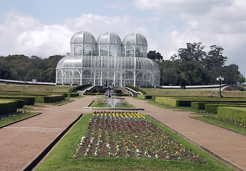 Jardim Botânico - Curitiba